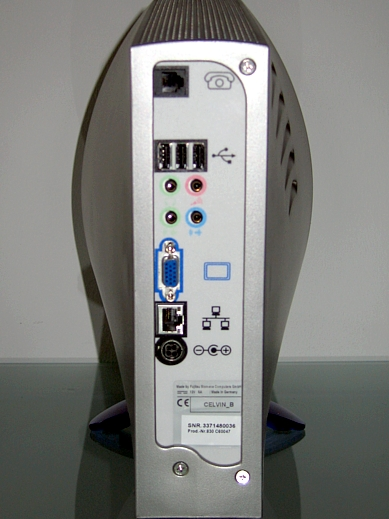 FujitsuSiemens Celvin